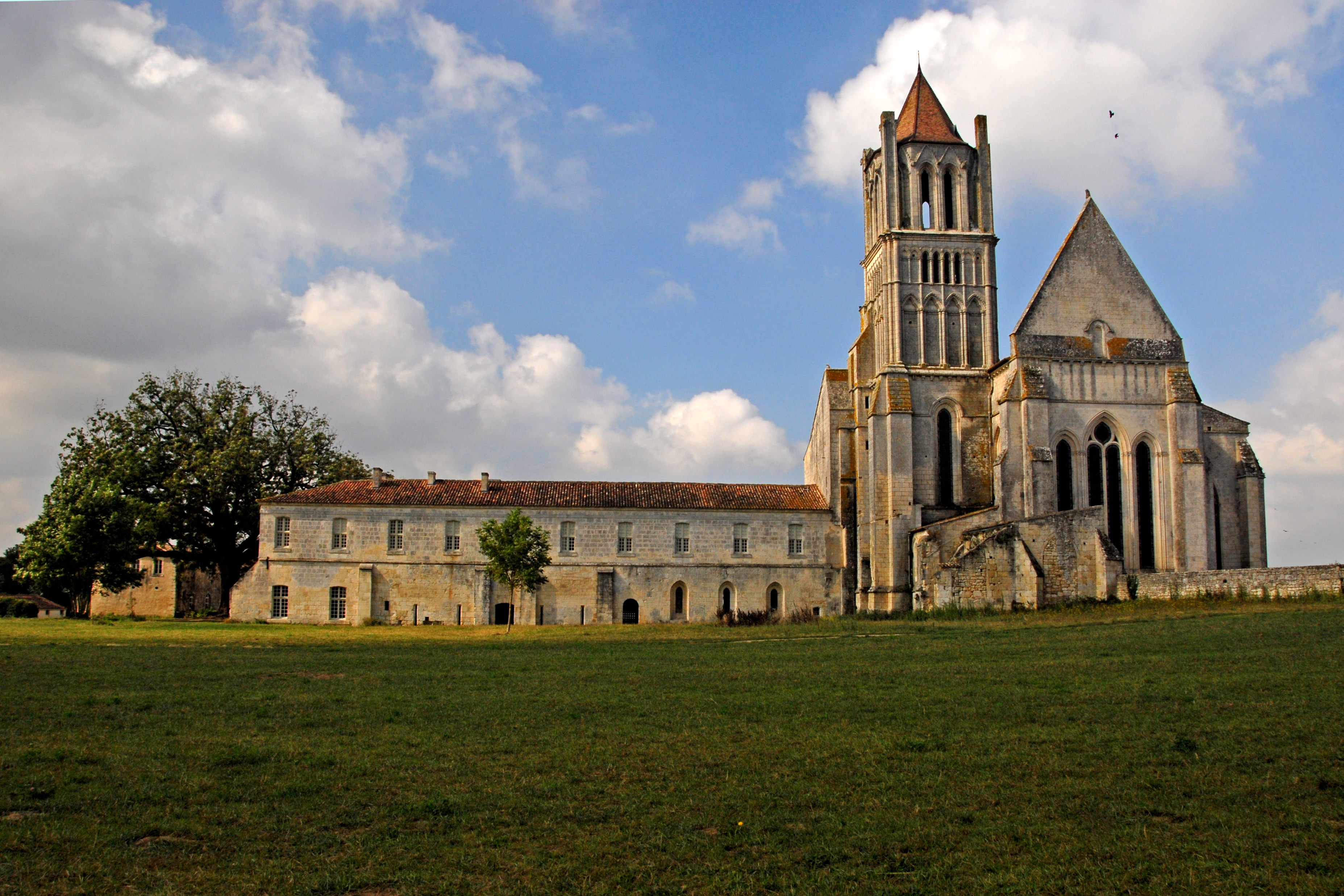 Abtei Sanblonceaux, Ansich von osten